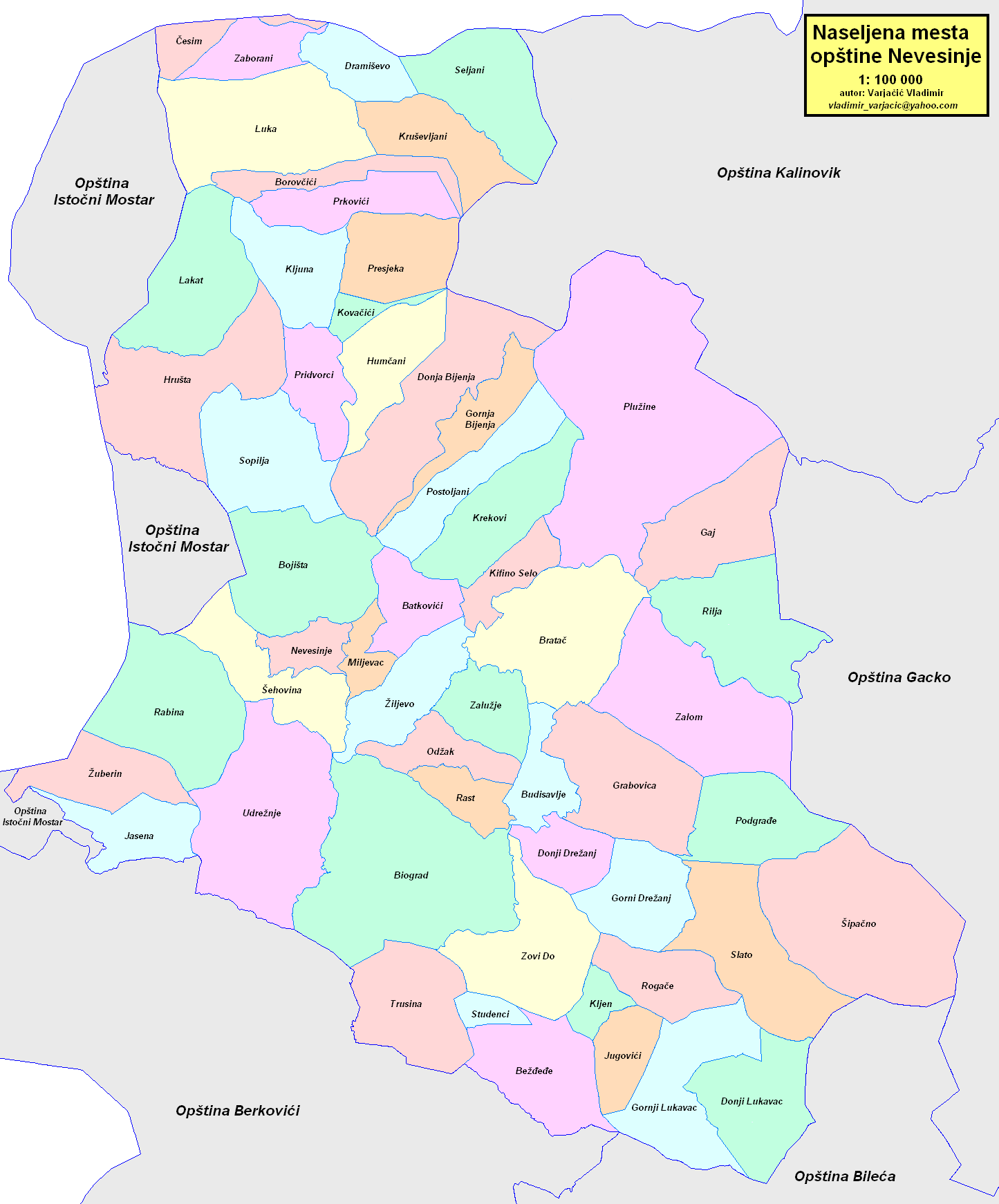 Opština Nevesinje